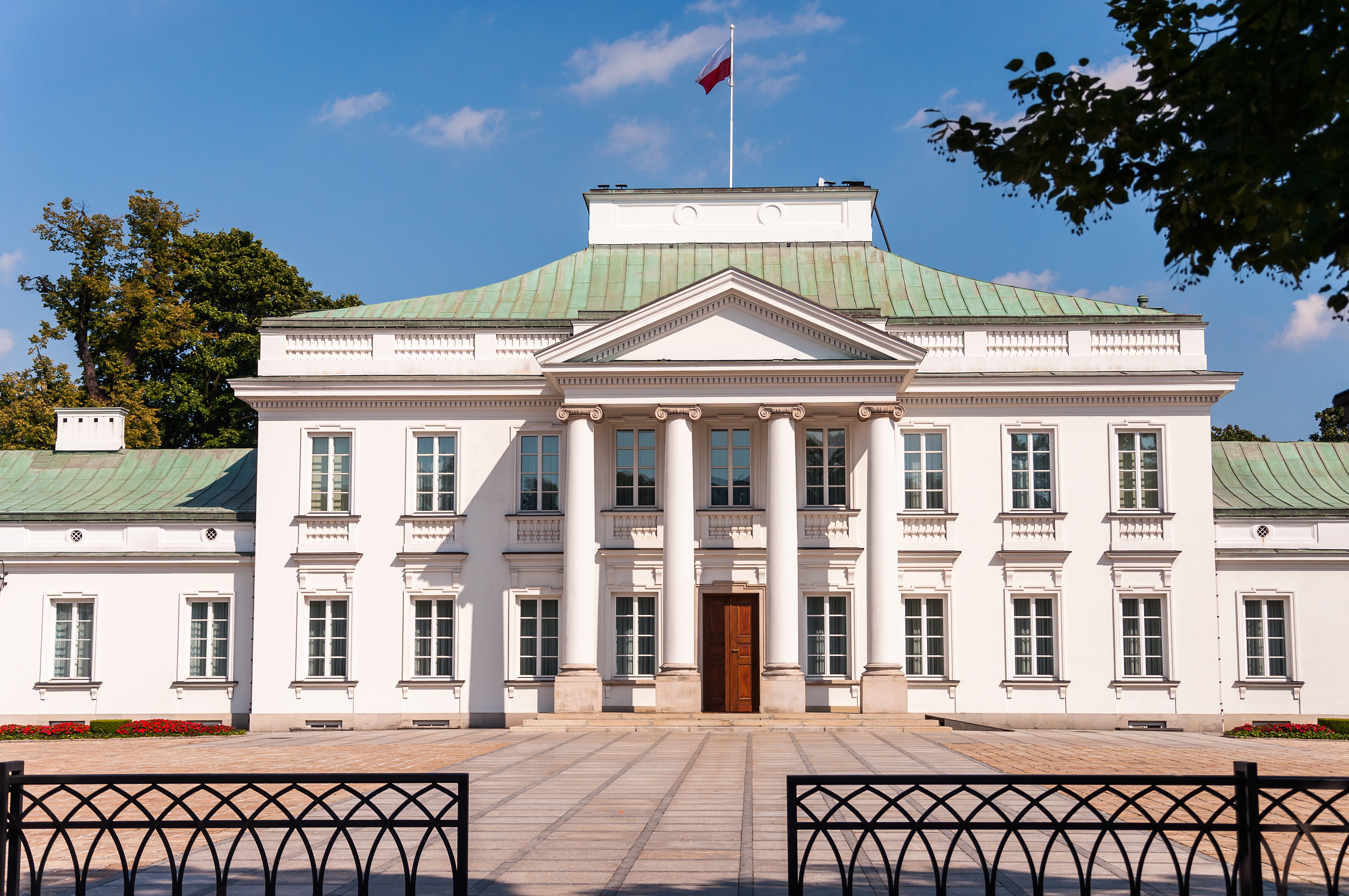 Warszawa, ul. Belwederska 54/56. Pałac Belweder.